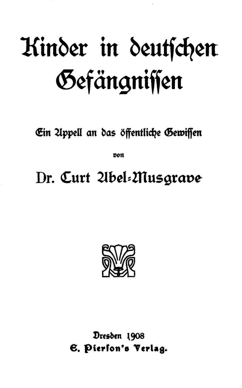 Curt Abel-Musgrave: Kinder in deutschen Gefängnissen. Ein Appell an das öffentliche Gewissen (= Kinderen in Duitse gevangenissen. Een beroep naar de publiek geweten). E. Pierson’s Uitgeverij, Dresden 1908